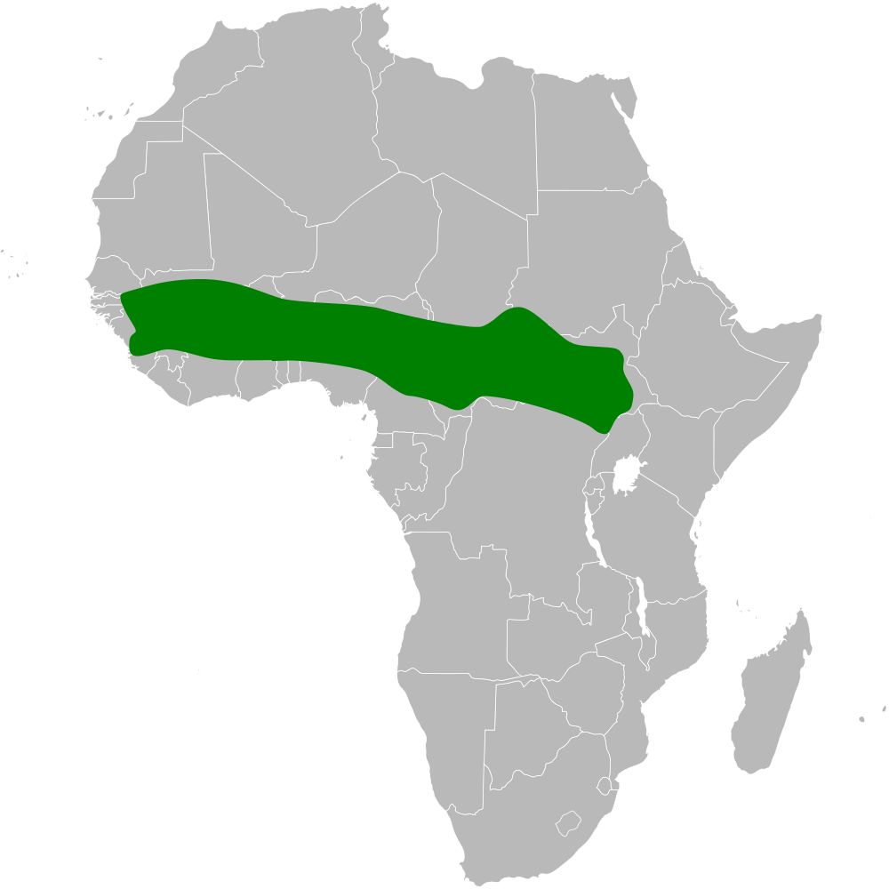 Galerida modesta distribution map, based on